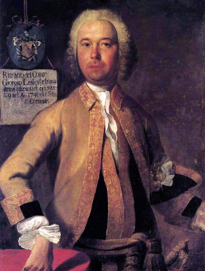 Г. Гроот (?). Портрет секунд-майора кирасирского полка Г.Ю.Лесли. 1749